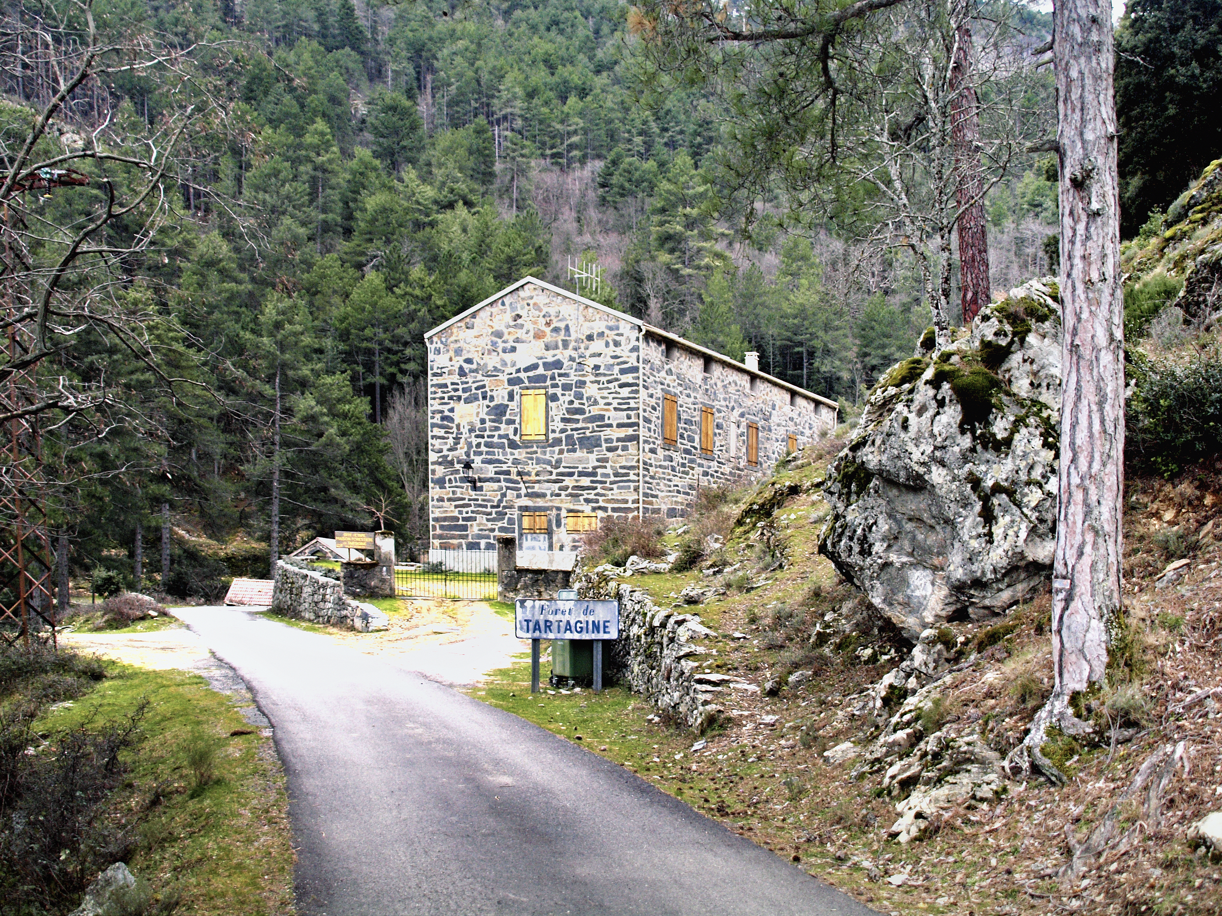 Olmi-Cappella (Corsica) - Maison forestière de Tartagine